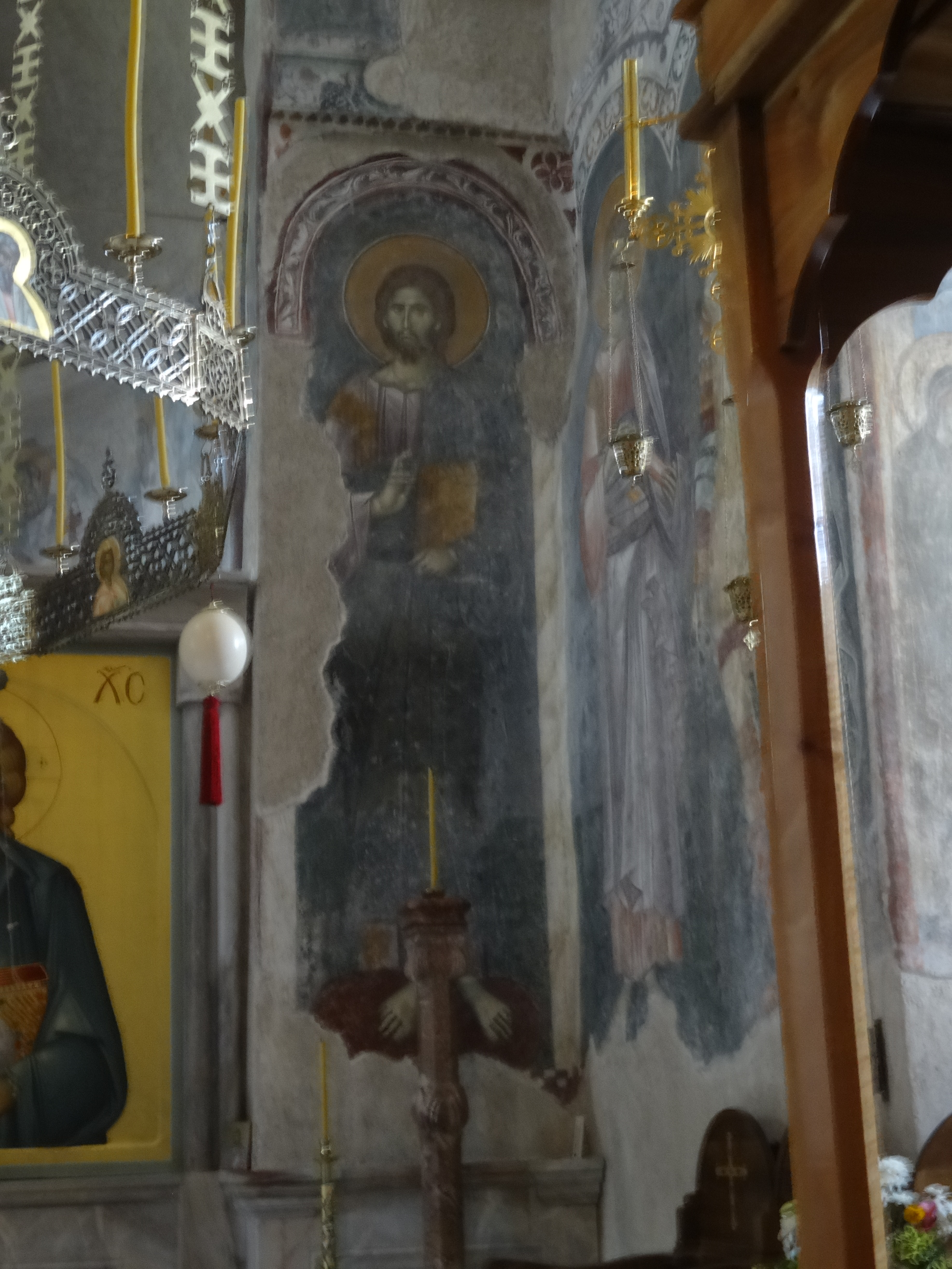 Жича је српски средњовековни манастир из прве половине 13. века, који се налази у близини Краљева. Подигао ју је први краљ Србије, Стефан Немањић.